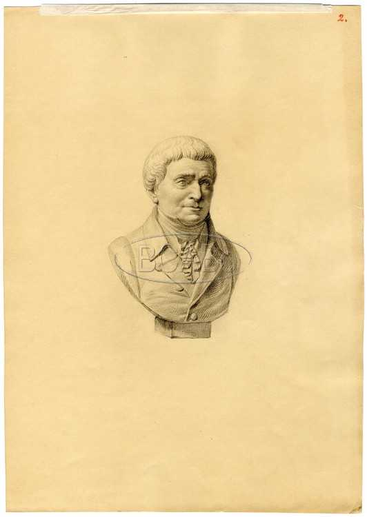 Angelo Venturoli in un disegno a matita che ne rappresenta il busto.